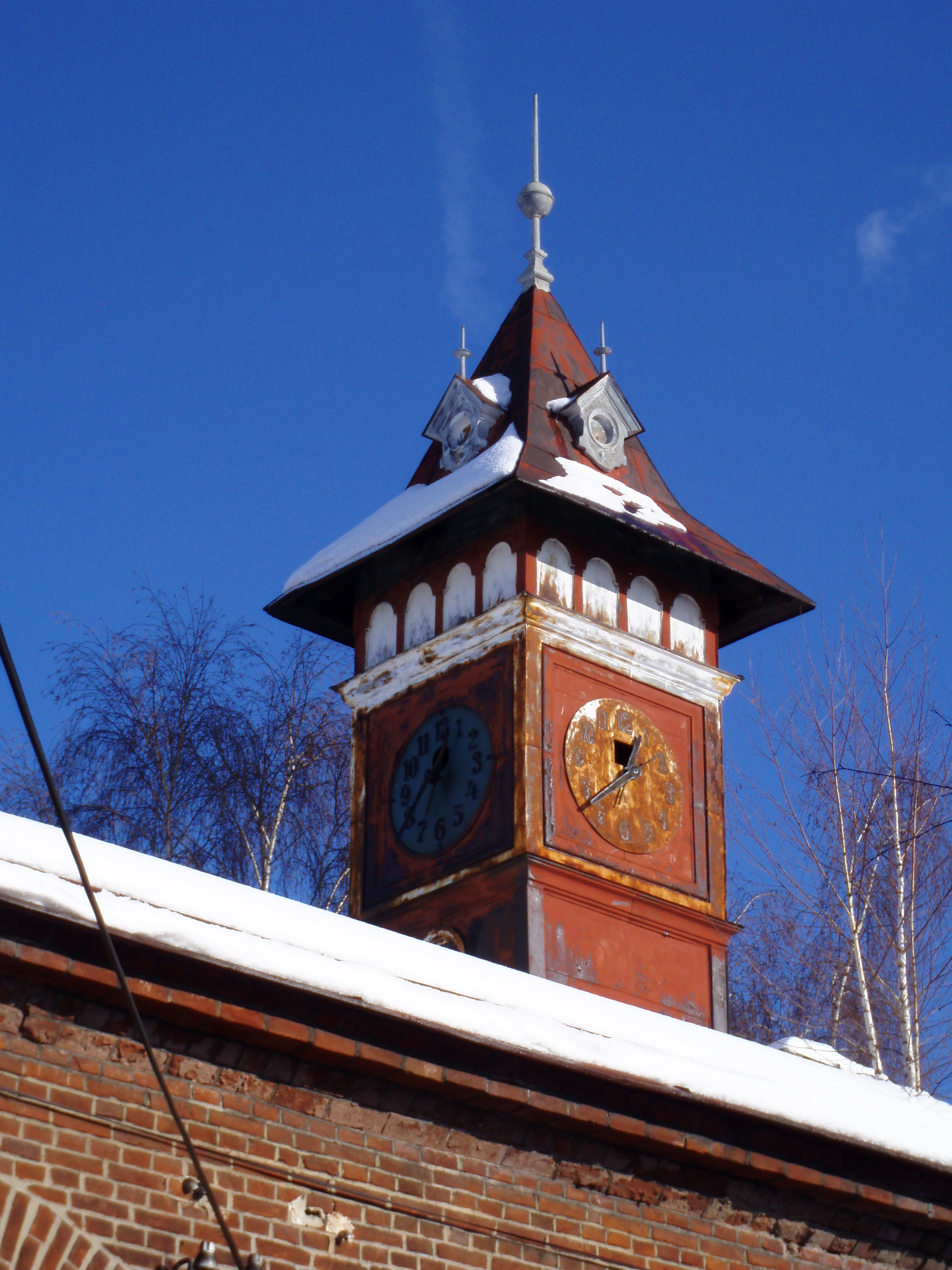 Kuklenská koželužna